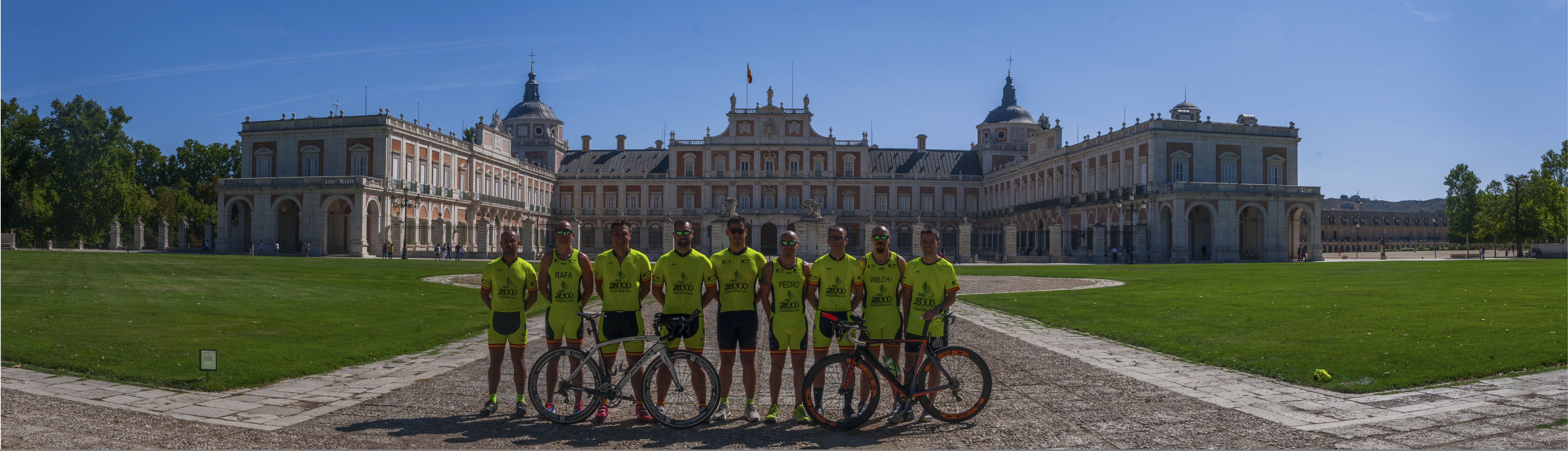 El Club triathlon 28300 Aranjuez posando con su equipaciòn alternativa (amarillo / negro).